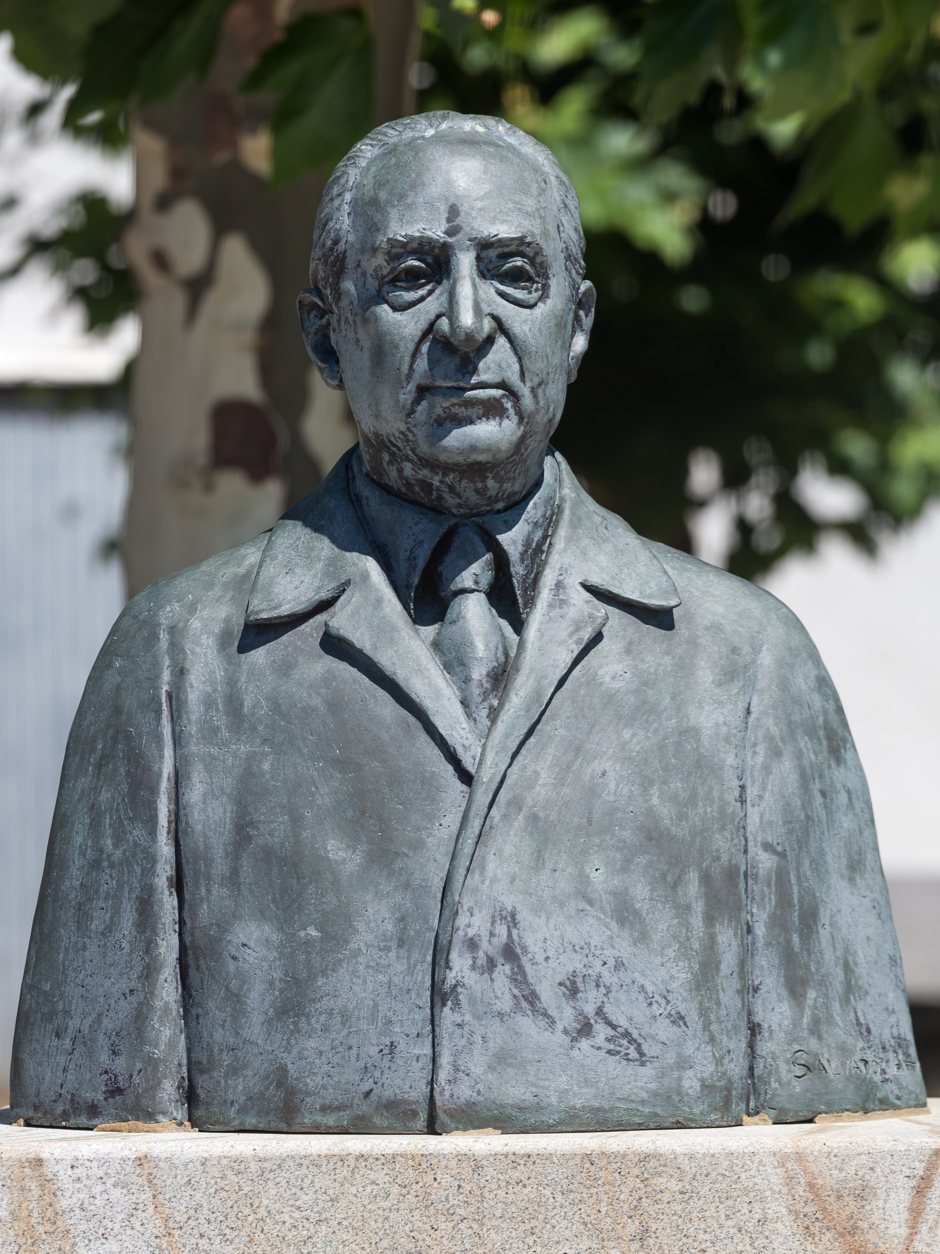 Busto de Julio Camba. Escultura de Salvador Amaya. Vilanova de Arousa. Galiza.